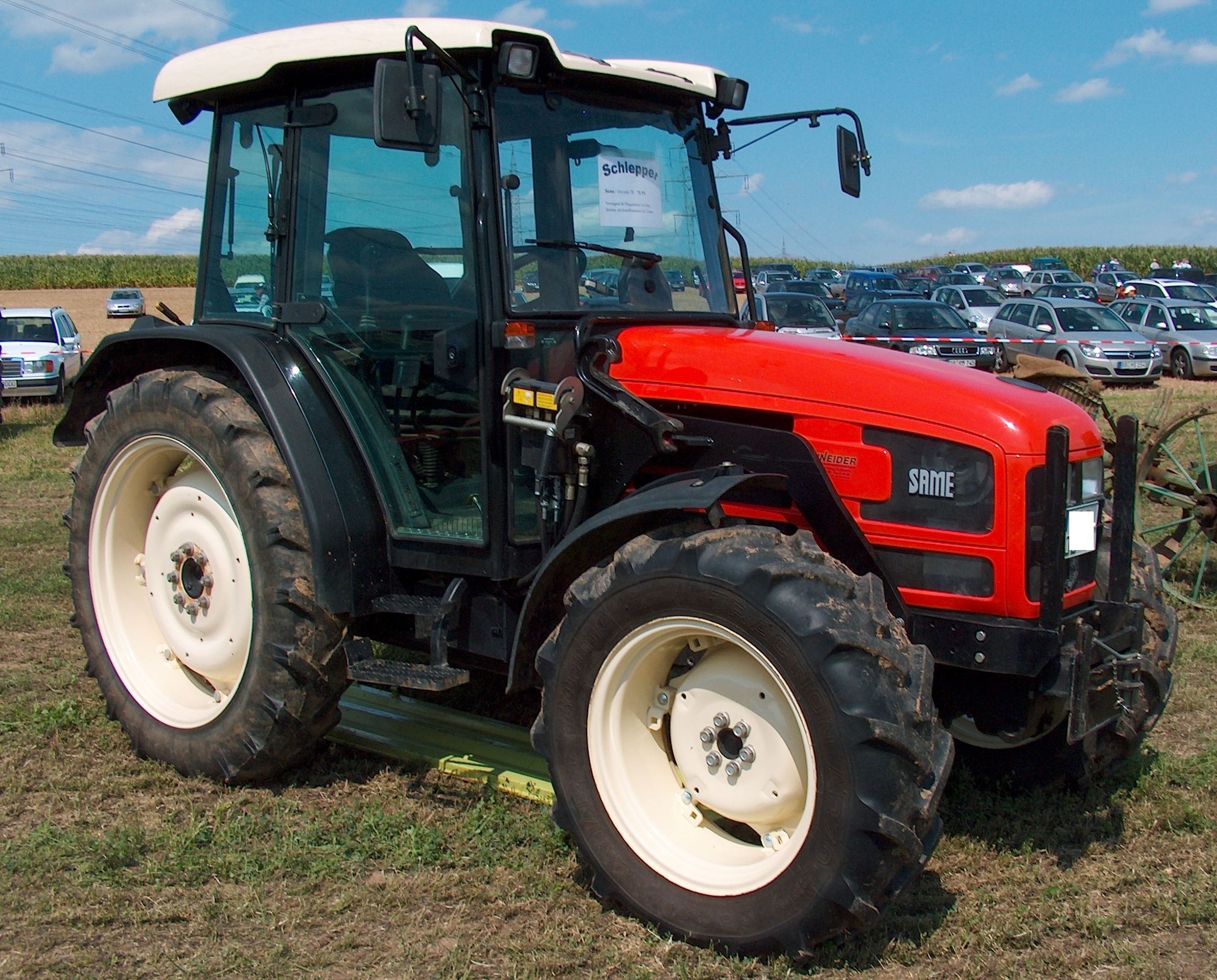 SAME Dorado 70, 70-PS-Traktor